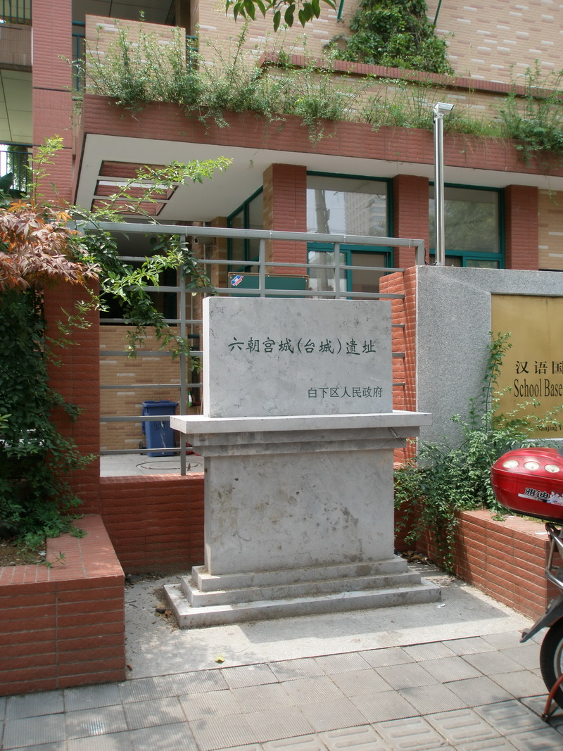 六朝宫城（台城）遗址